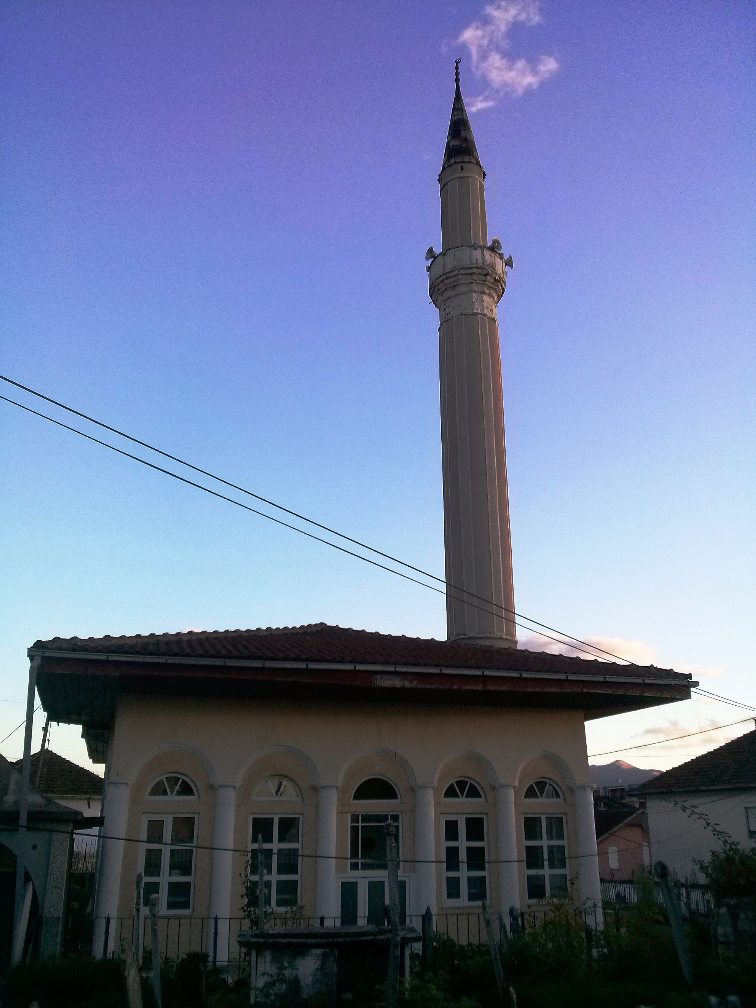 „Инкјар џамија“, Дебар